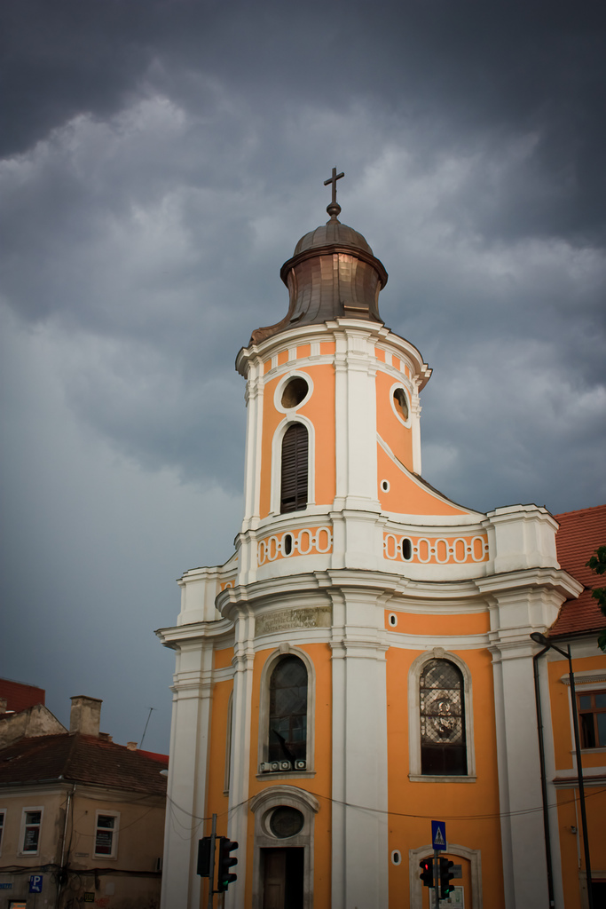 cluj - biserica catolica